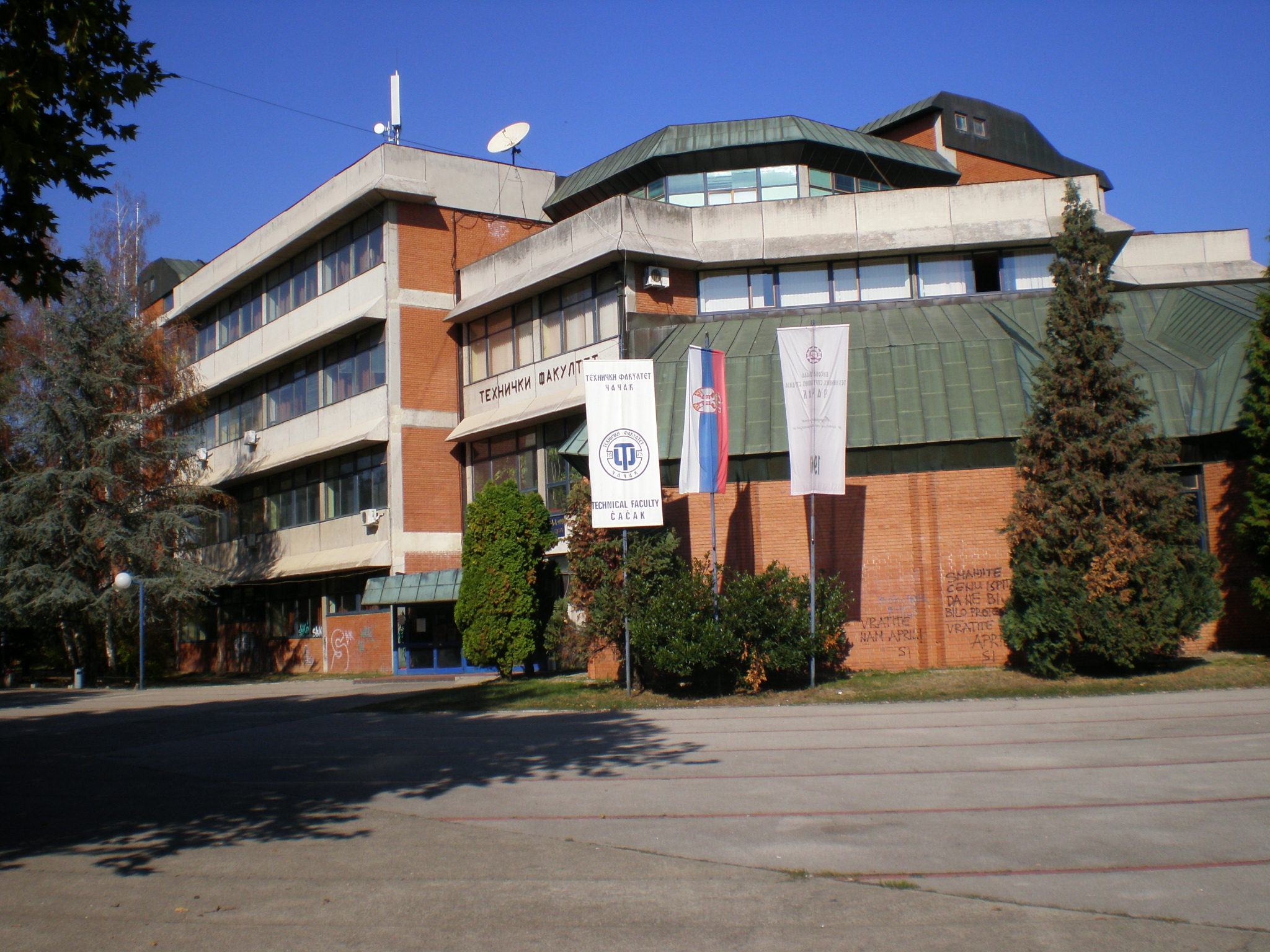 Факултет техничких наука у Чачку је део Универзитета у Крагујевцу. Основан је 1975. године као педагошко-технички факултет.